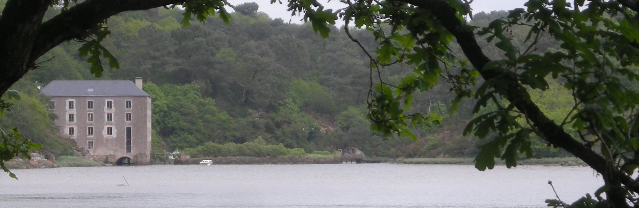 Le moulin à marée de Pont-Sal, vu depuis la rive droite de la rivière du Bono